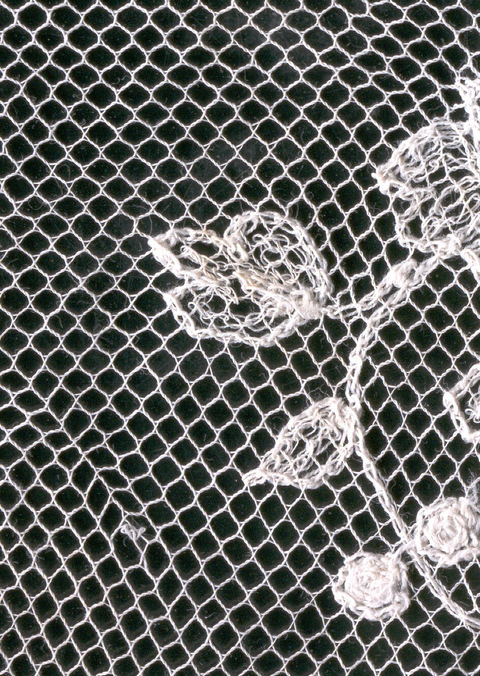 private collection